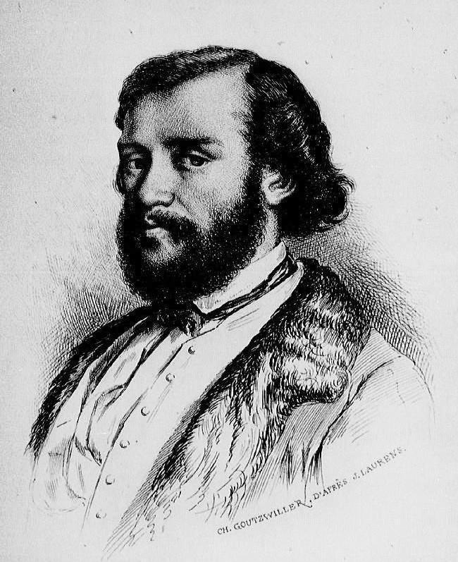 Portrait de Xavier Hommaire de Hell, lithographié par Charles Goutzwiller d'après un dessin Jules Laurens. Publié dans : Angel Ingold (dir.), Biographies alsaciennes, Antoine Meyer, Colmar, 1886.